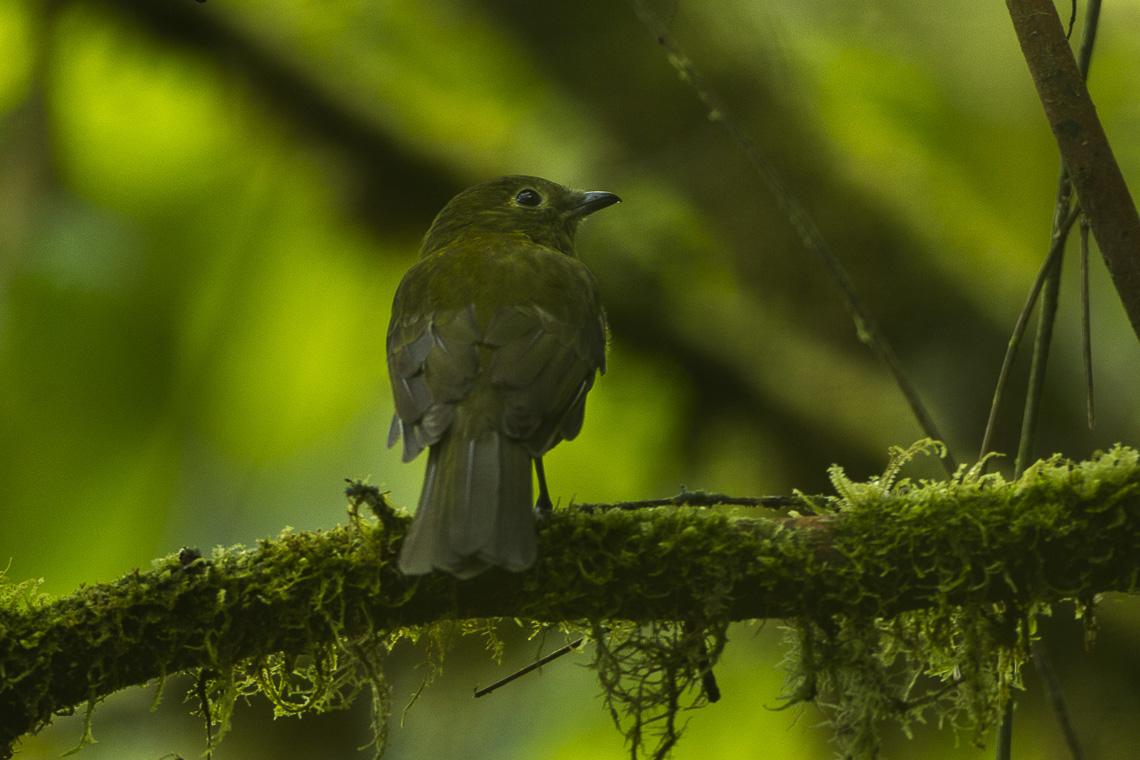 Olivaceous Piha - Colombia_S4E3368